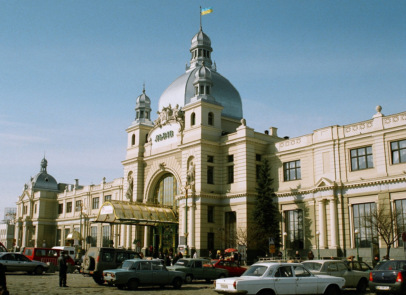 Dworzec Główny we Lwowie, wybudowany w roku 1903, foto Marek Silarski, 2006, marzec 26